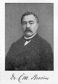 Portrait von Caspar Max Brosius